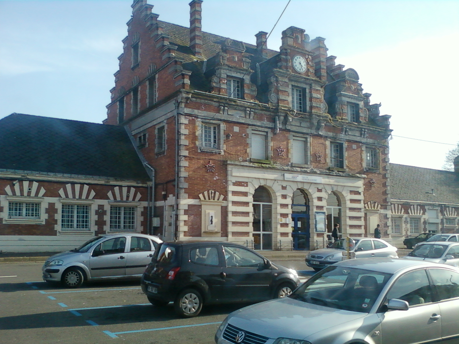 Photo de la gare d'hénin Beaumont dans le nord de la France